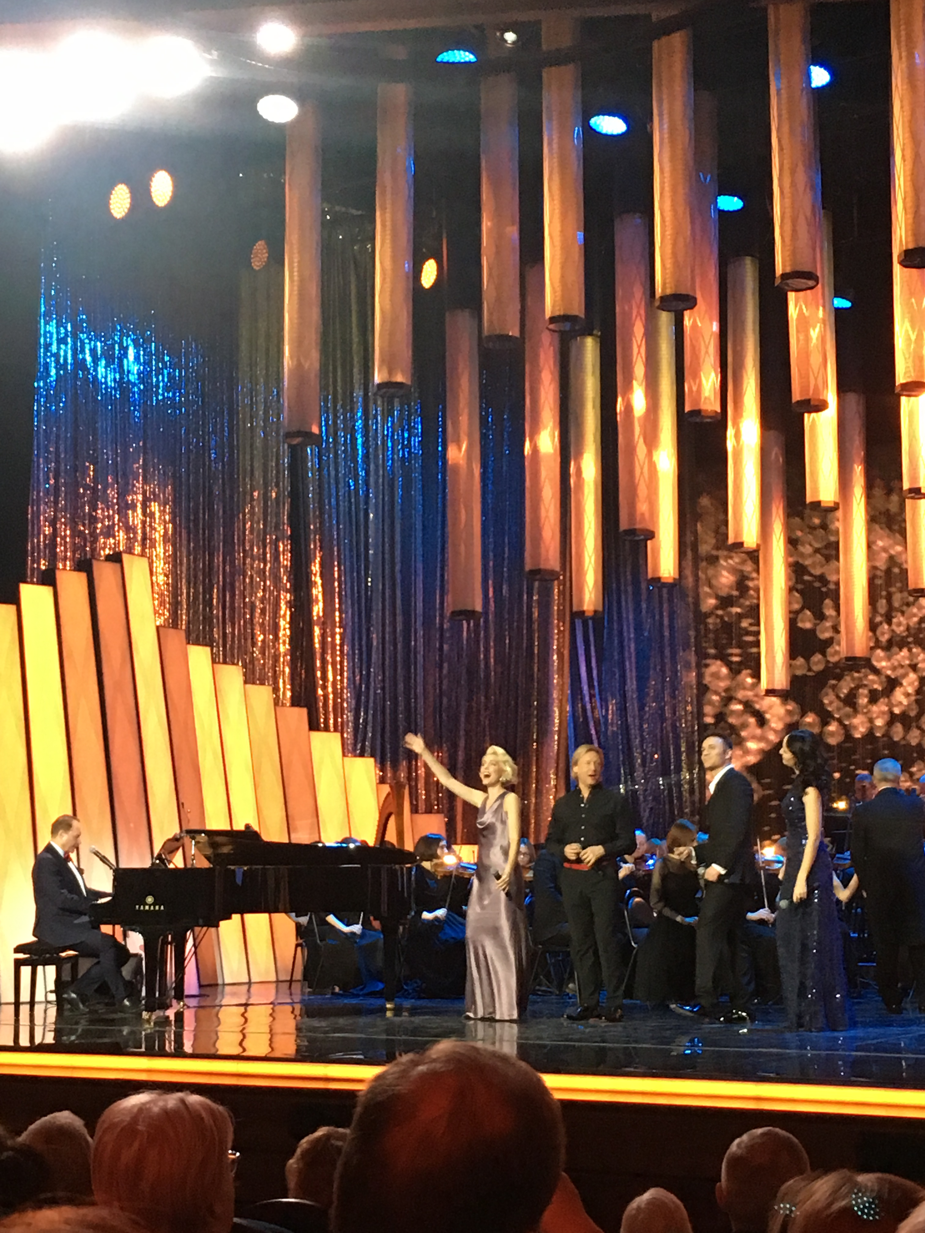 Запись концерта "Мистер Совершенство!" встреча с Максимом Дунаевским (к 75-летию композитора). Проект "Романтика Романса", телеканал "Культура"